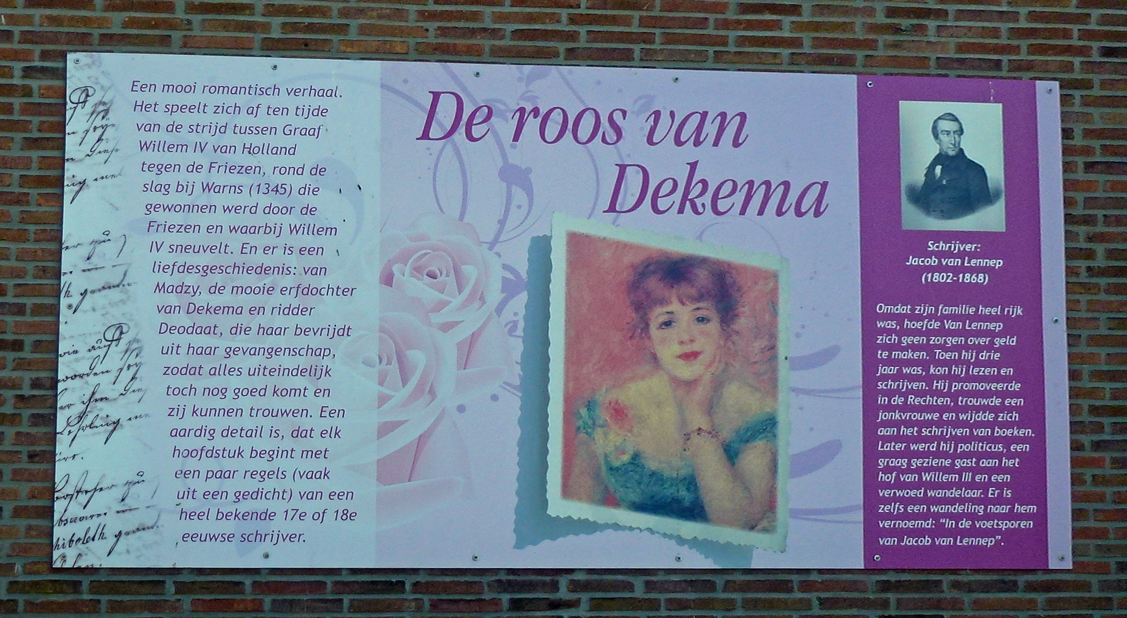 Straatnaam beschrijving. De roos van Dekema is geschreven door Jacob van Lennep